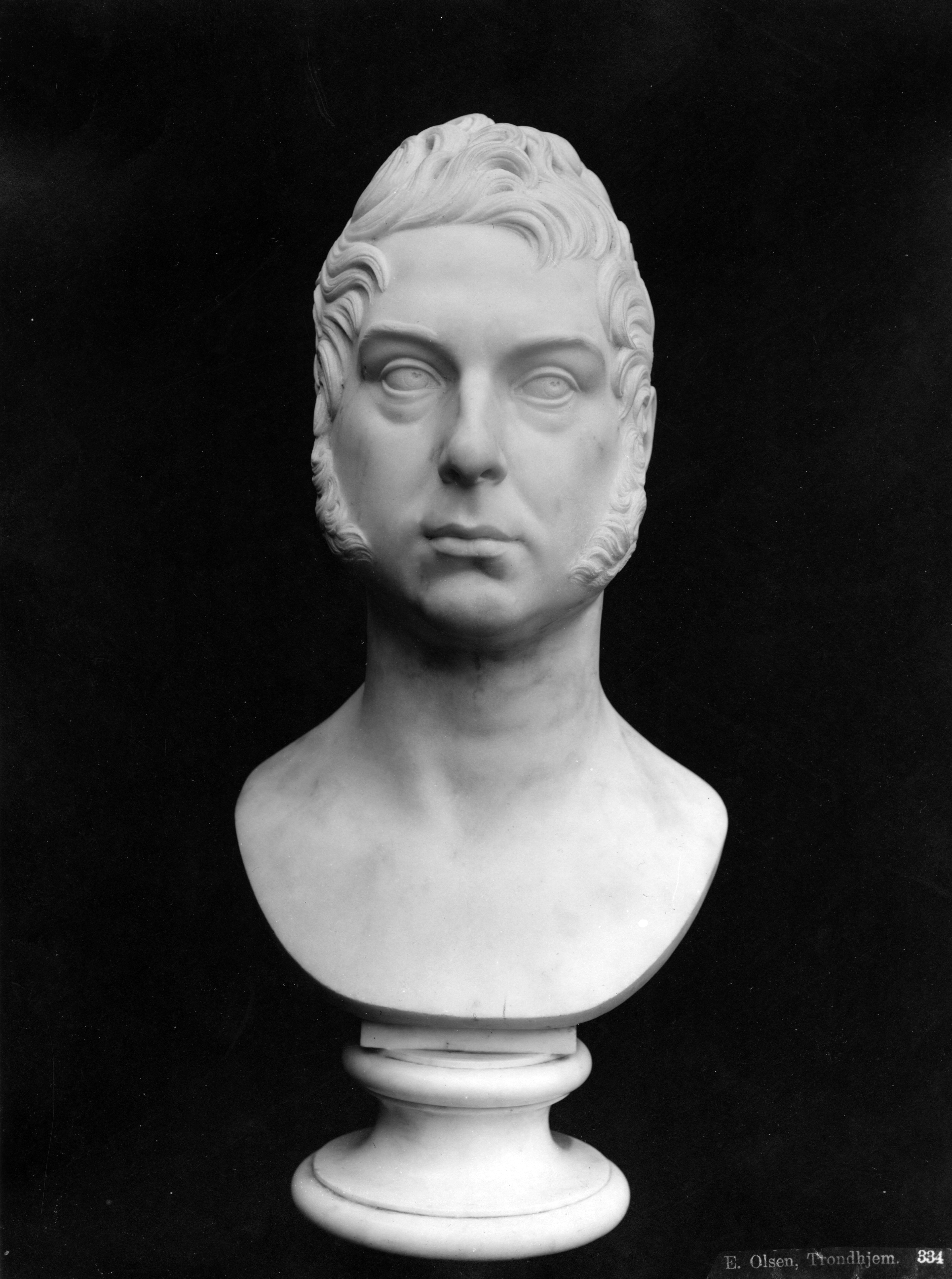 Format: Fotopositiv Dato / Date: 1897 Fotograf / Photographer: Erik Olsen (1835 - 1920) Kunstner / Artist: Bertel Thorvaldsen (1770 - 1844) Sted / Place: Trondheim Lenke / Link: Bertel Thorvaldsen (Wikipedia) Eier / Owner Institution: Trondheim byarkiv, The Municipal Archives of Trondheim Arkivreferanse / Archive reference: Tor.H41.B44.F3230 Merknad: Fra utstillingen i anledning Trondhjems 900-årsjubileum i 1897. Utstillingstekst i Trondhjems 900 Aars Jubilæum: Katalog for Den Historiske Udstilling i Trondhjem 1897: 618. Baillie, Alexander, Jørgen Knudtzons fortrolige Ven og Reisefælle, d. i Neapel 24/1 1855. Buste i Marmor af Thorvaldsen 1816. En smule fyldigt regelmæssigt Ansigt med liden, fin Mund og svag Hage. Kindskjæg og Haaret ved Tindingerne kjæmmet fremad. Paa Bagsiden sign: [symbol] H. 57.(5) cm., uden Sokkel 48 cm. * Videnskabsselskabet.